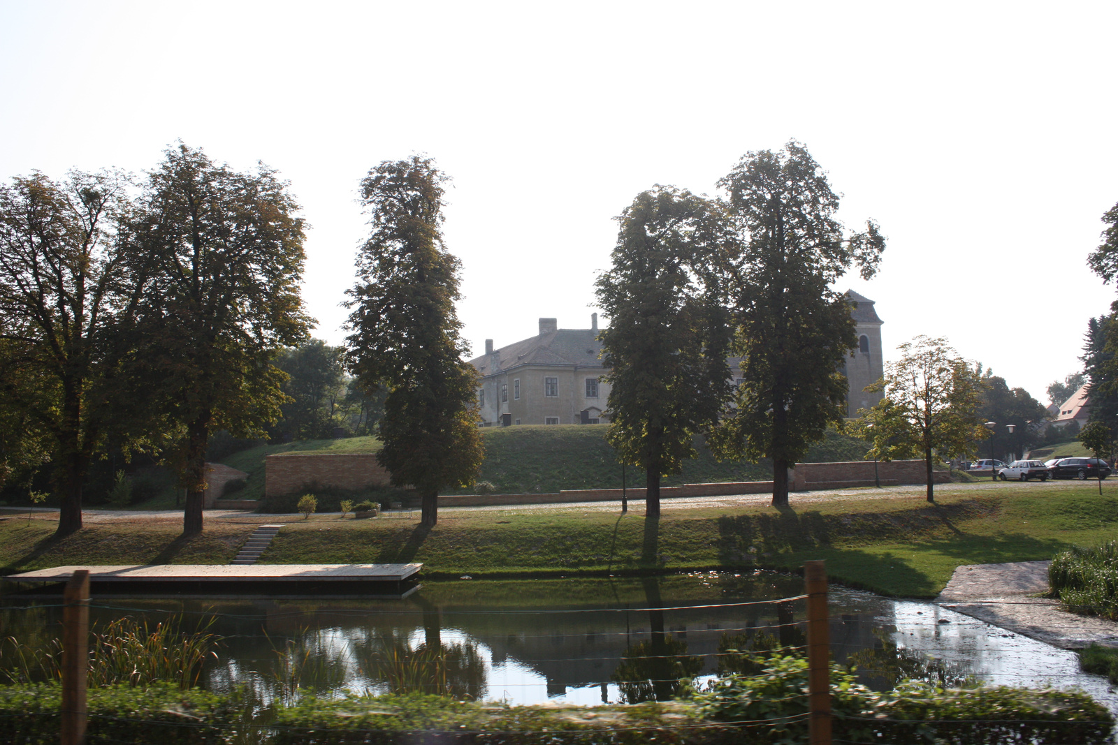 Vár (Mosonmagyaróvár, Pozsonyi út 88.) This is a photo of a monument in Hungary, Identifier: 18045